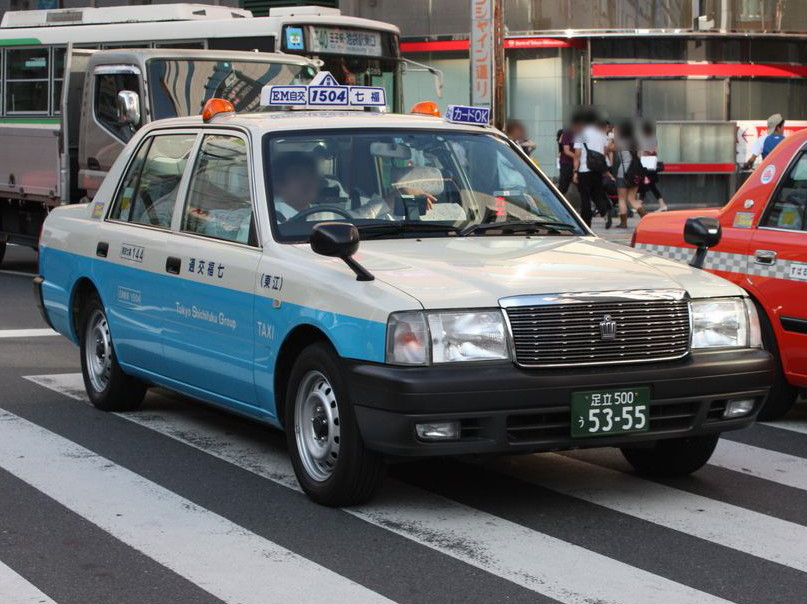 七福交通のタクシー 池袋駅付近にて撮影